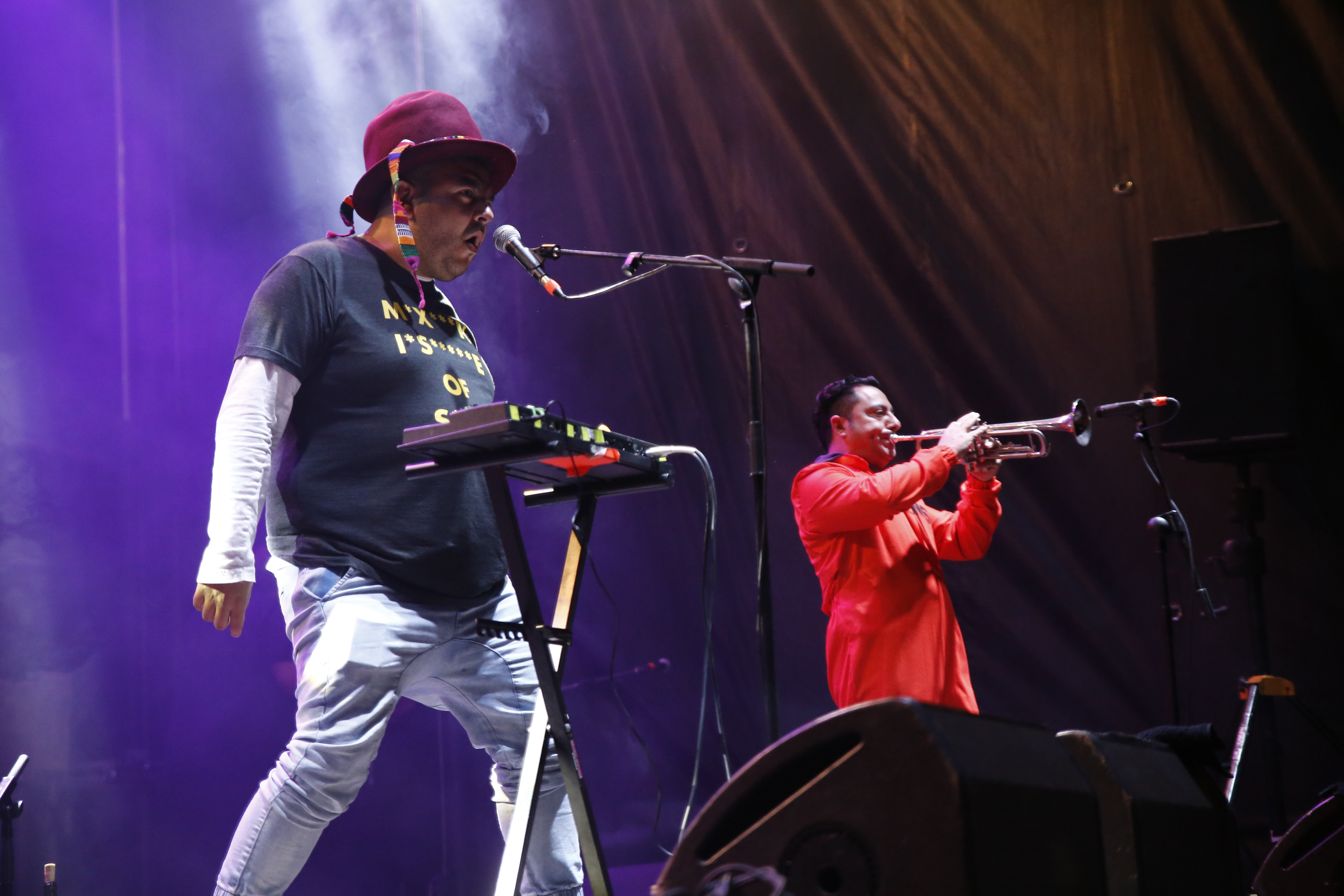 El grupo Instituto Mexicano del Sonido en el festival Palencia Sonora 2019.